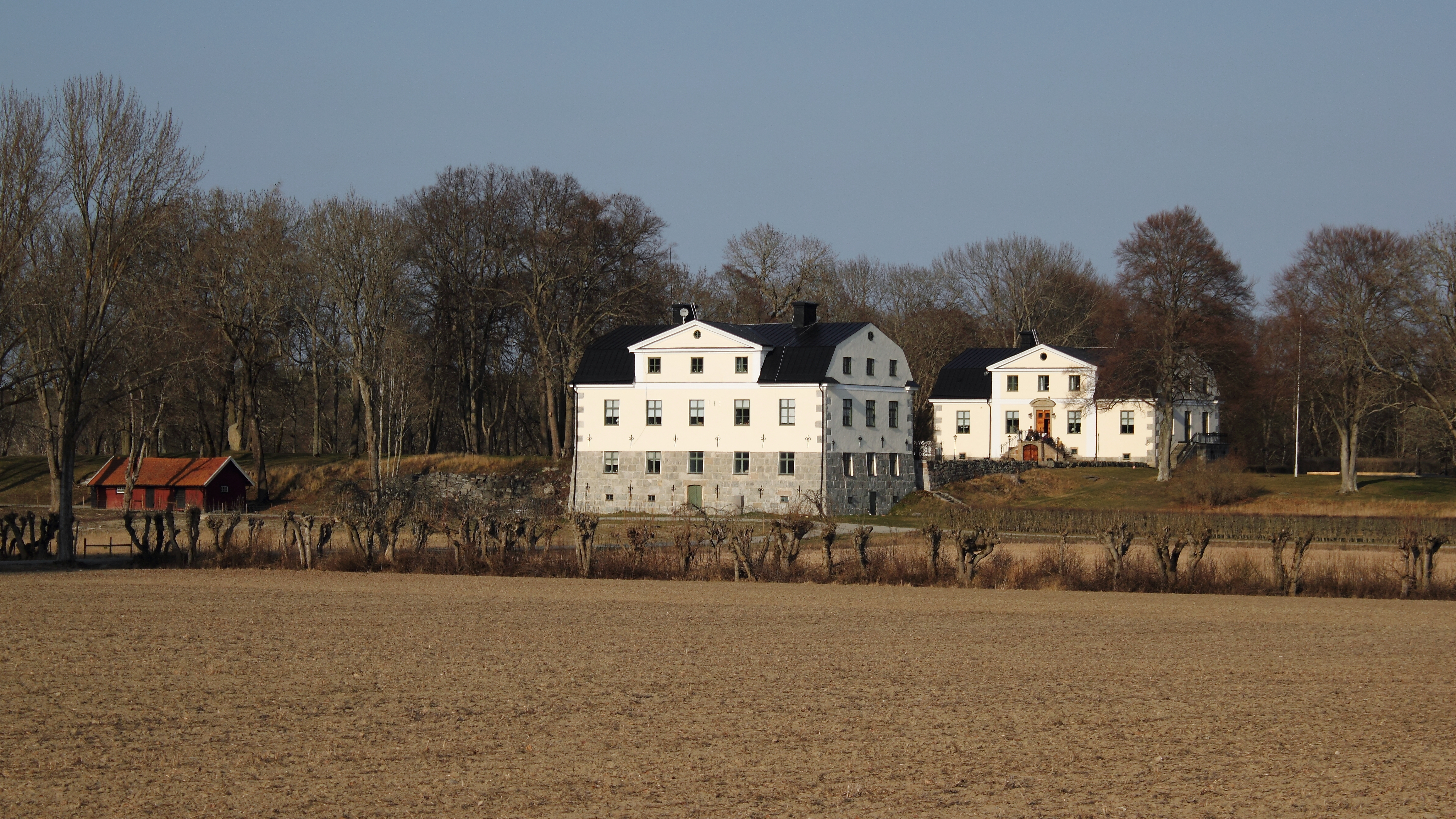 Målhammars gods, Björksta socken